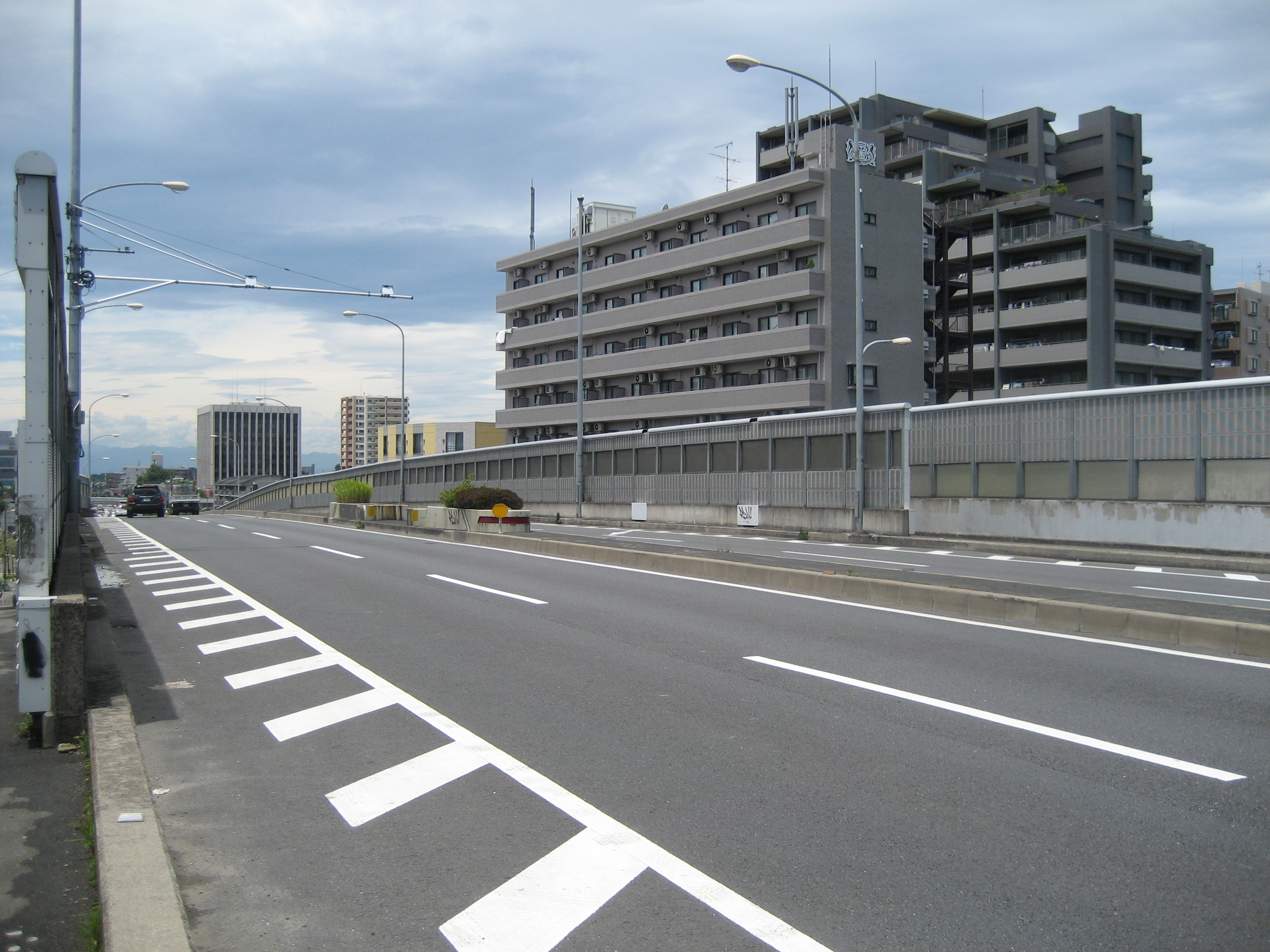 国道４６３号線浦和区新浦和橋（有料道路時代の料金所跡）